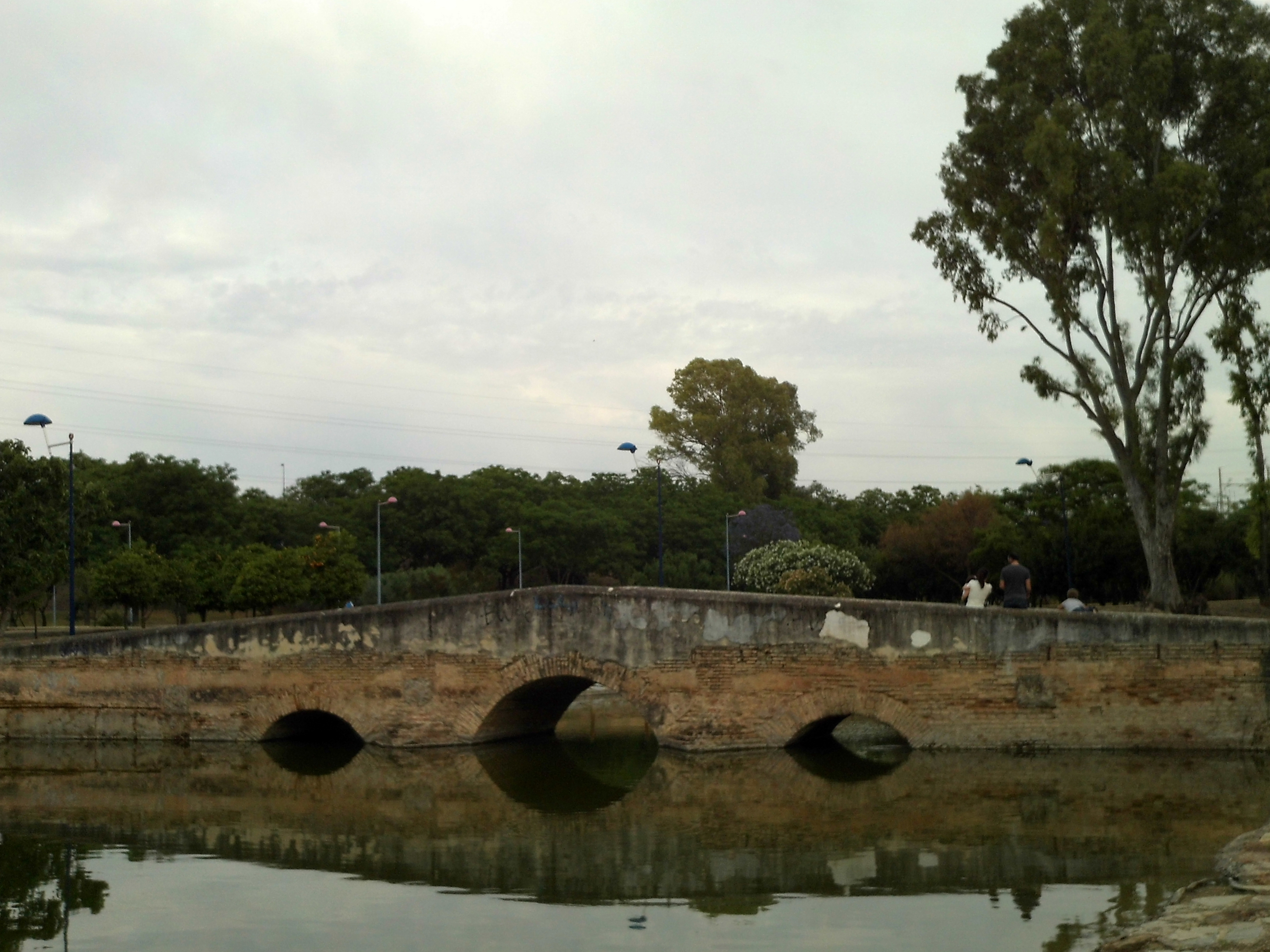 Puente en el parque de Miraflores de Sevilla. Andalucía, España.